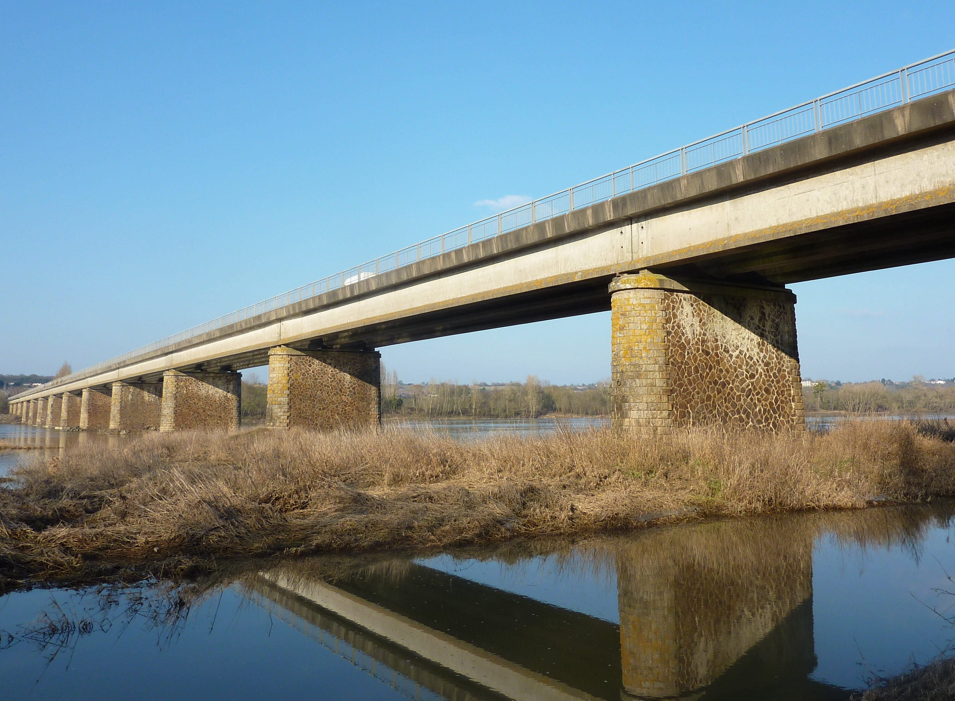 Vue d'ensemble